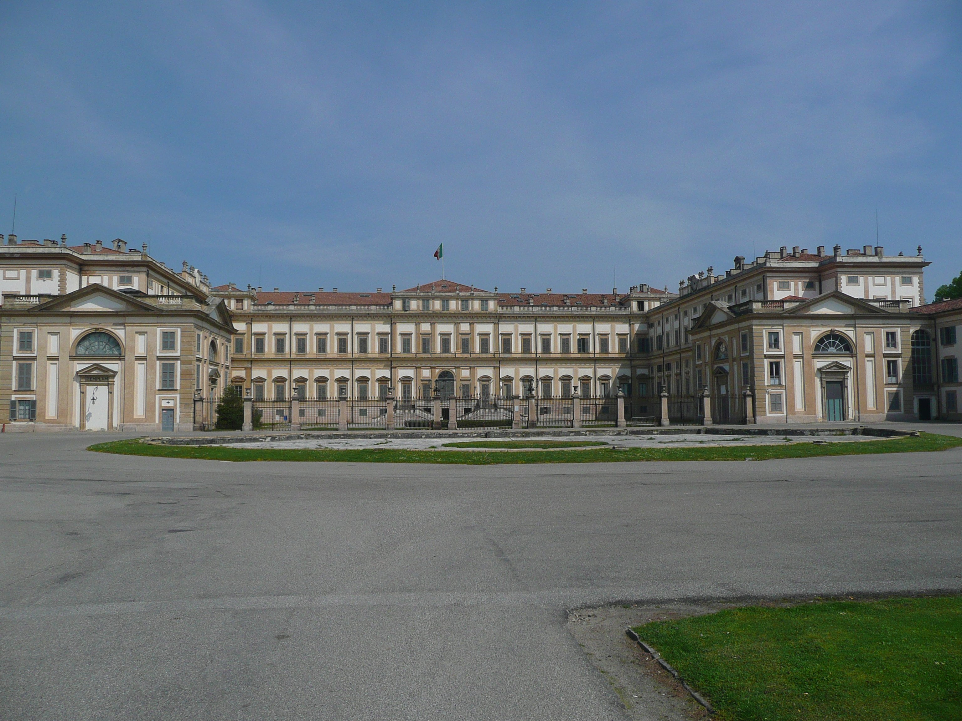 villa reale, monza, italy